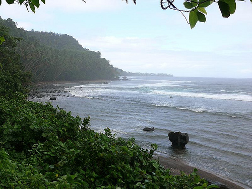 Taveuni, Fiji, ocean view Lavena Coastal Walk